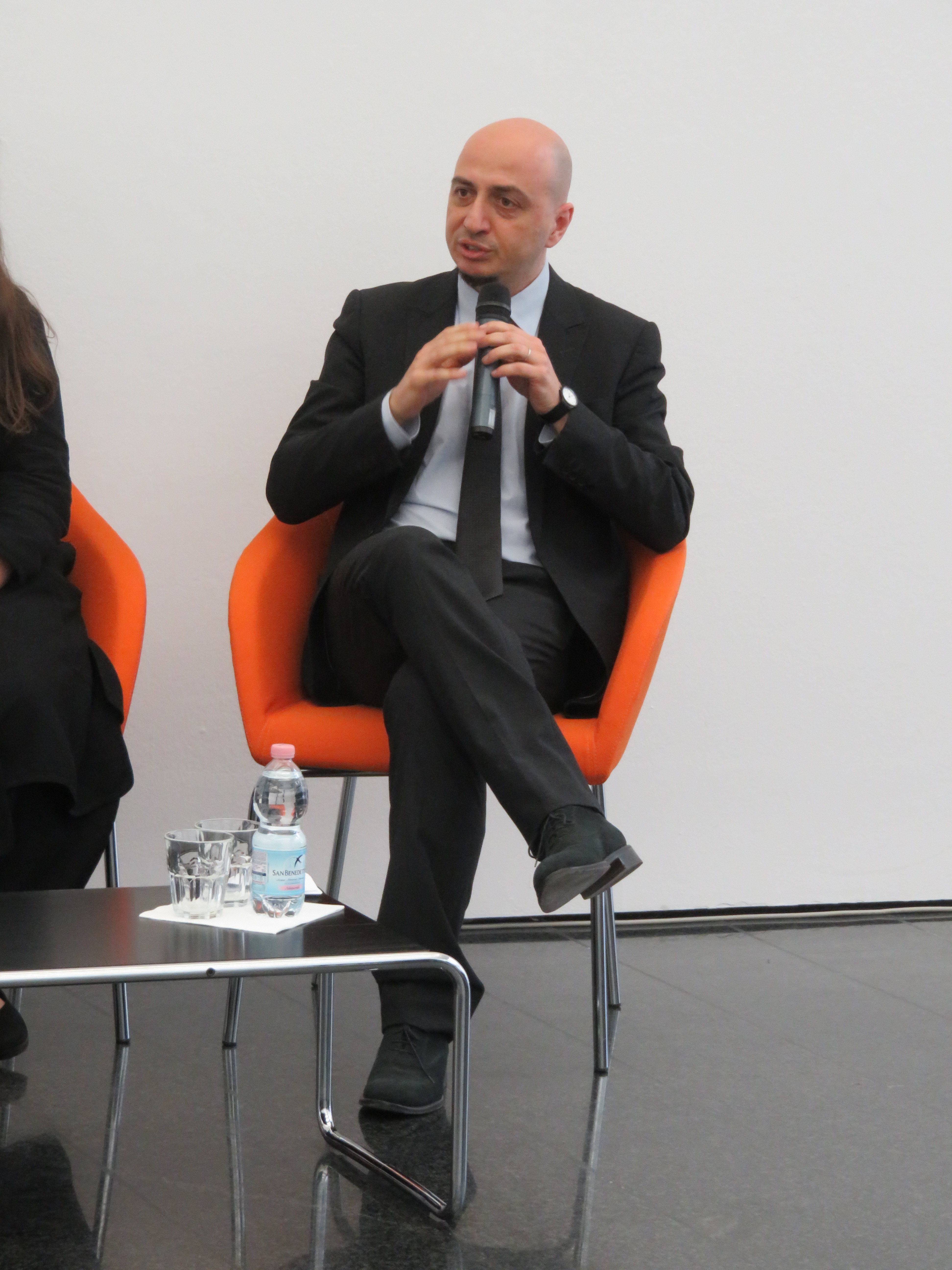 Gianfranco Maraniello ad una presentazione del Mart. Ogni autorizzazione dell'utilizzo dell'immagine è legata all'esclusivo ambito museale e professionale. Ogni altro utlizzo deve essere concordato con il diretto interessato che ha permesso esplicitamente di essere fotografato durante un momento di incontro di lavoro legato alla sua funzione.